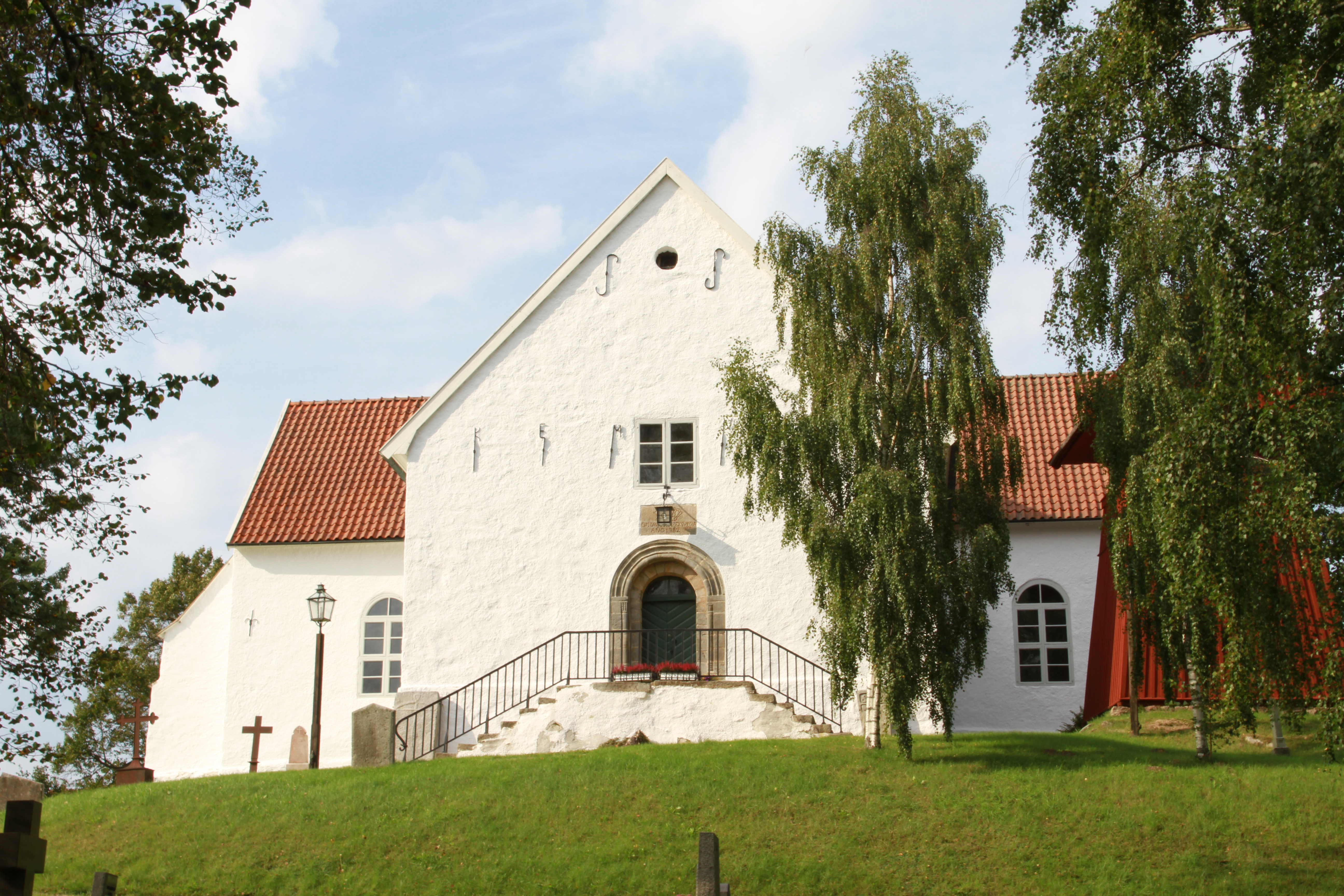 Foto taget på södersida